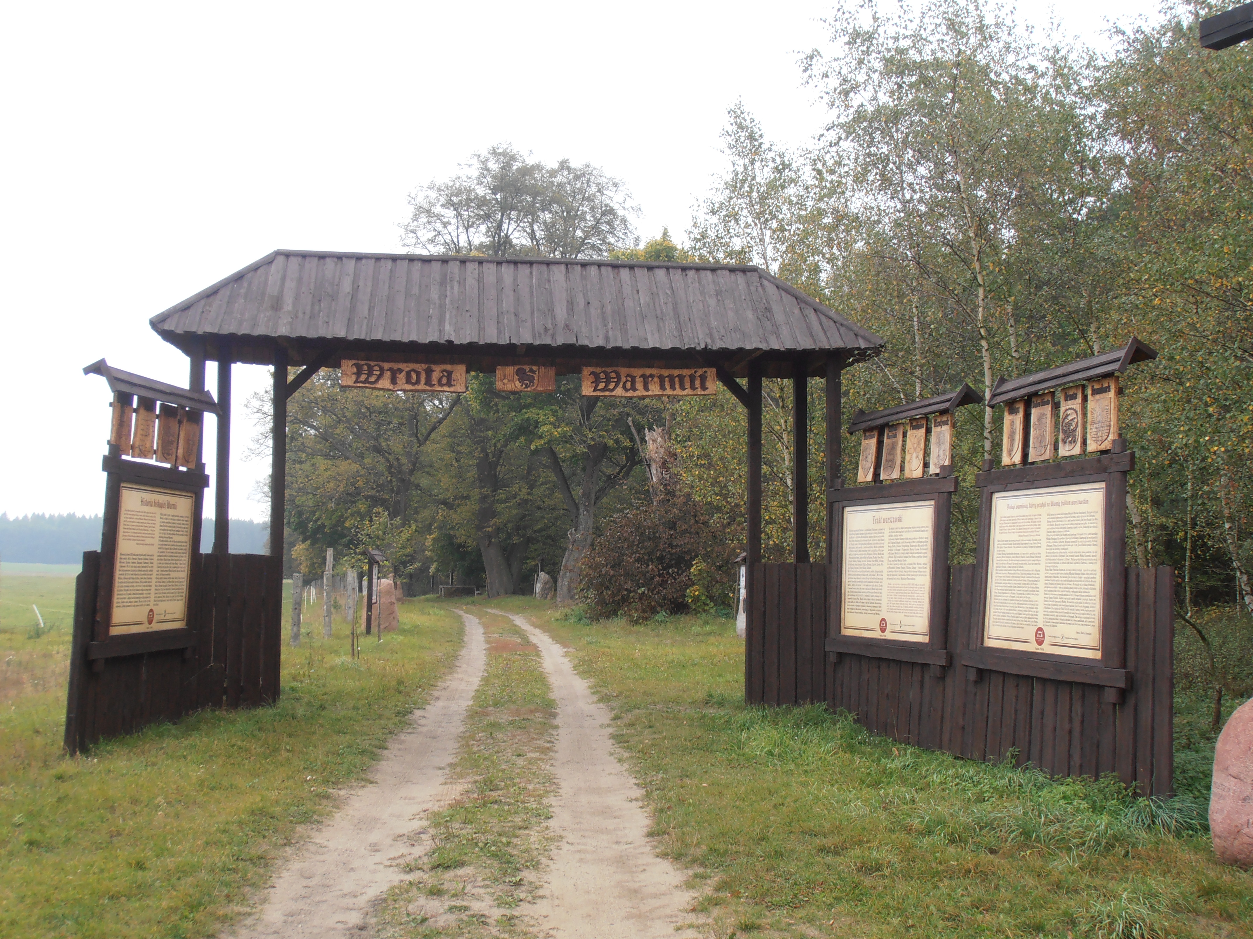 Bałdy - Wrota Warmii